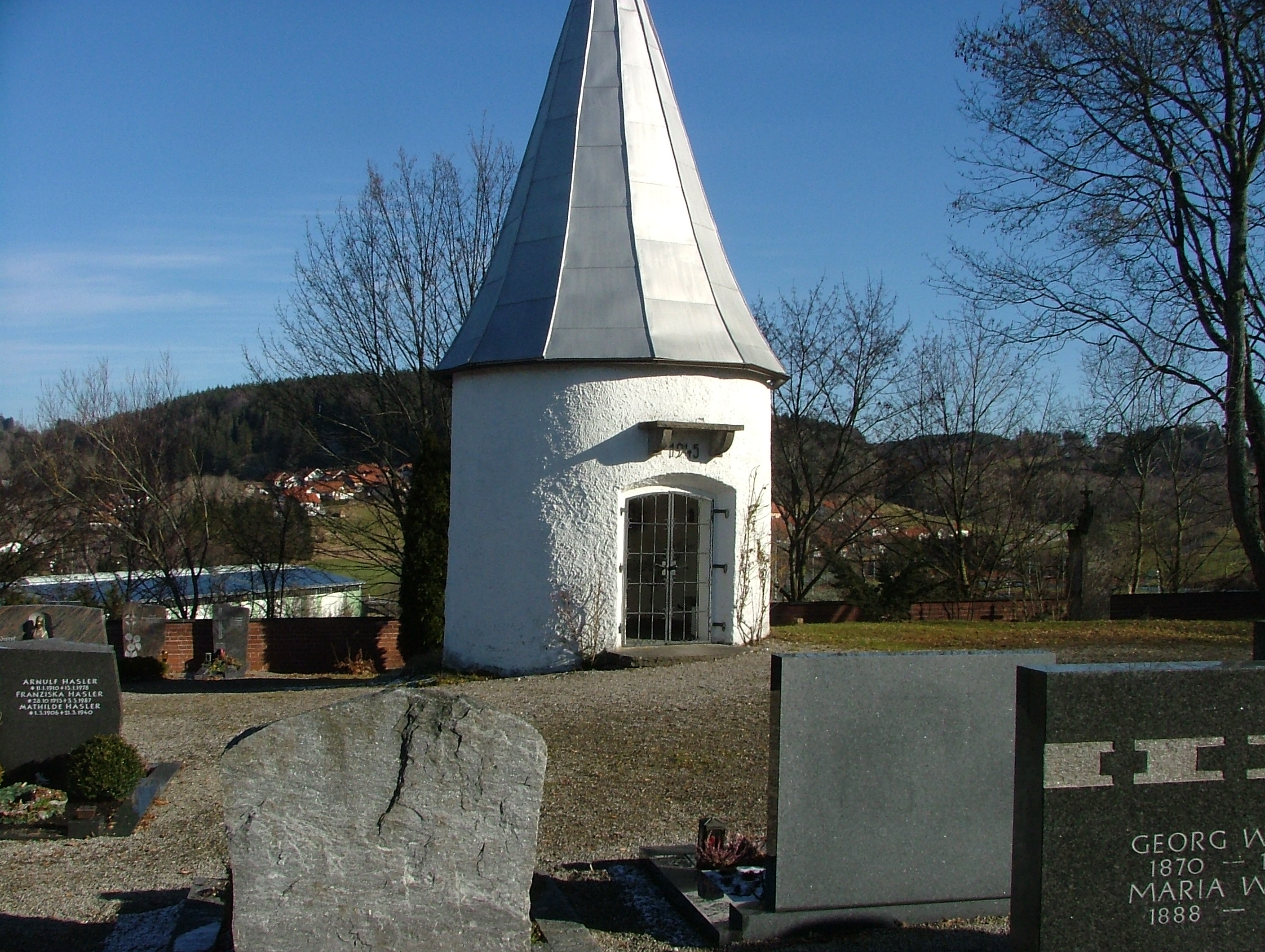 Obergünzburg